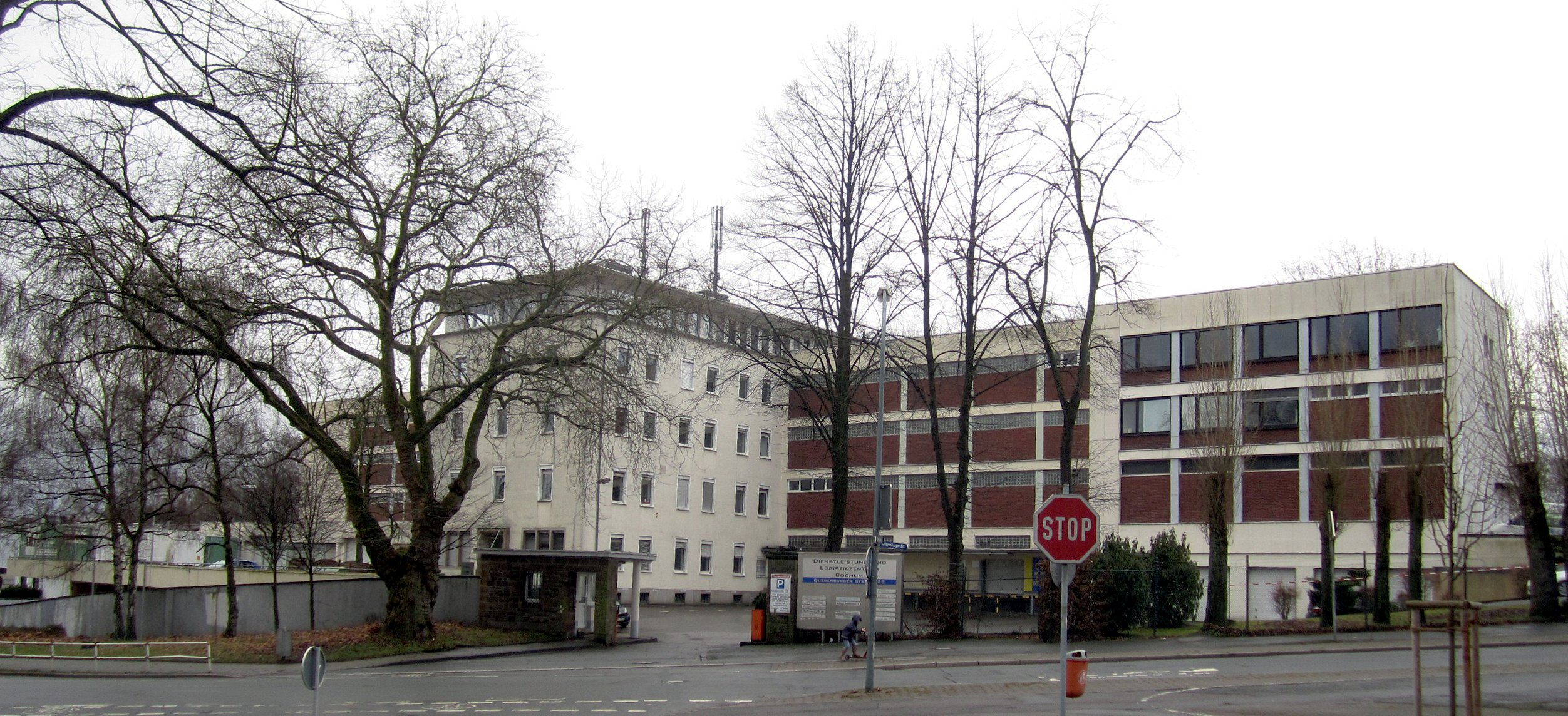 Das 1957 erbaute Verwaltungsgebäude der Westdeutschen Haushaltsversorgung in Bochum, Querenburger Straße 19.